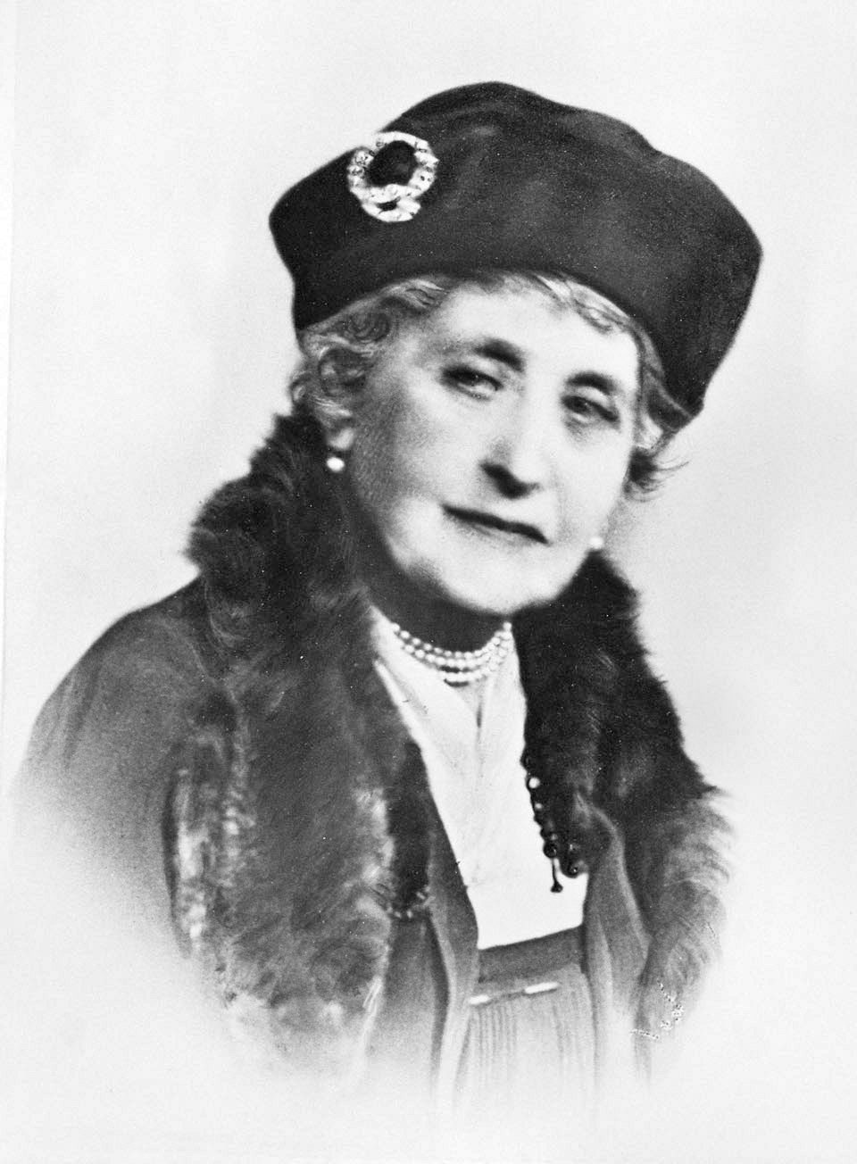 Princess Louise in her later years